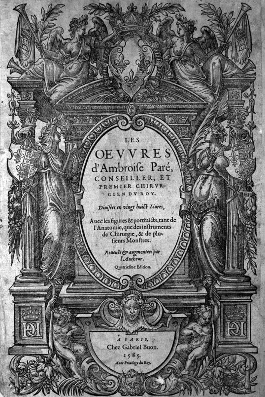 Ambroise Paré (1510?-1590): Les oeuvres d’Ambroise Paré, 1585.